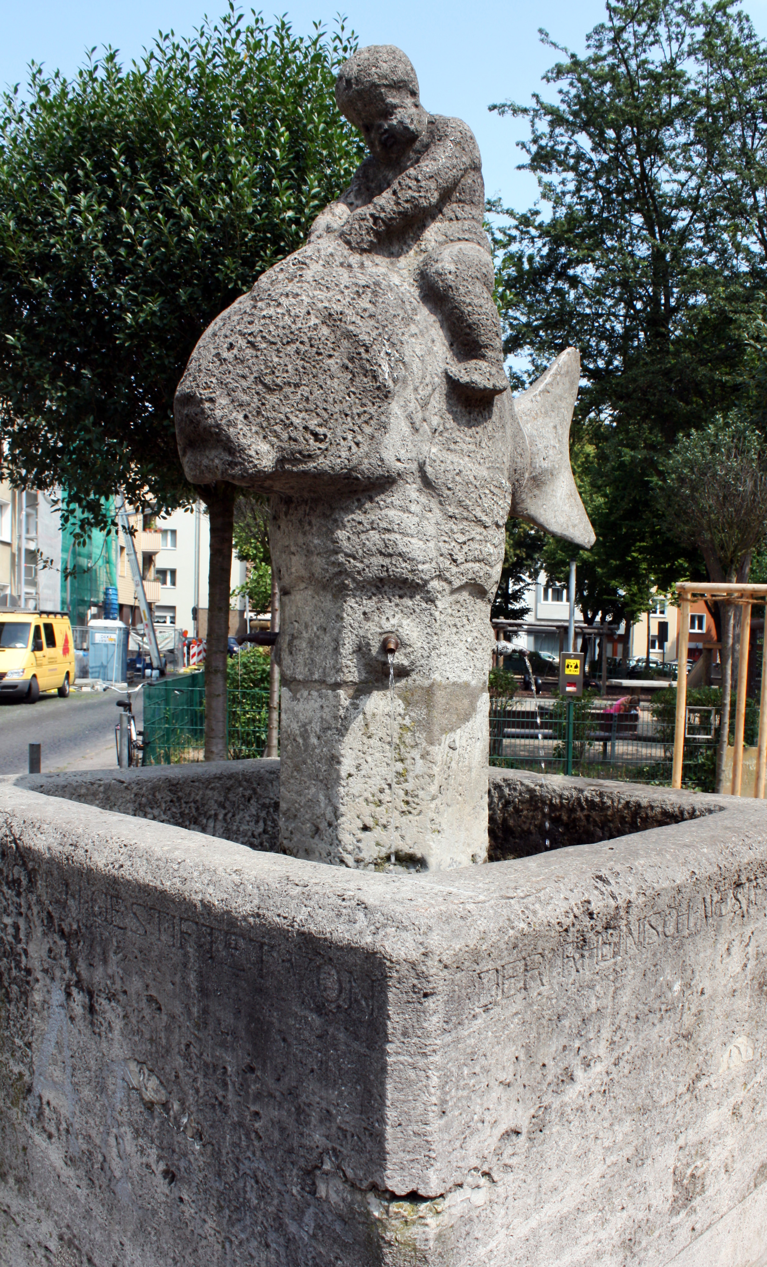 Fischreiterbrunnen Köln-Zollstock, Theophanoplatz. Der Brunnen aus Sandstein entstand um 1913 nach einem Entwurf von Georg Grasegger This is a photograph of an architectural monument.